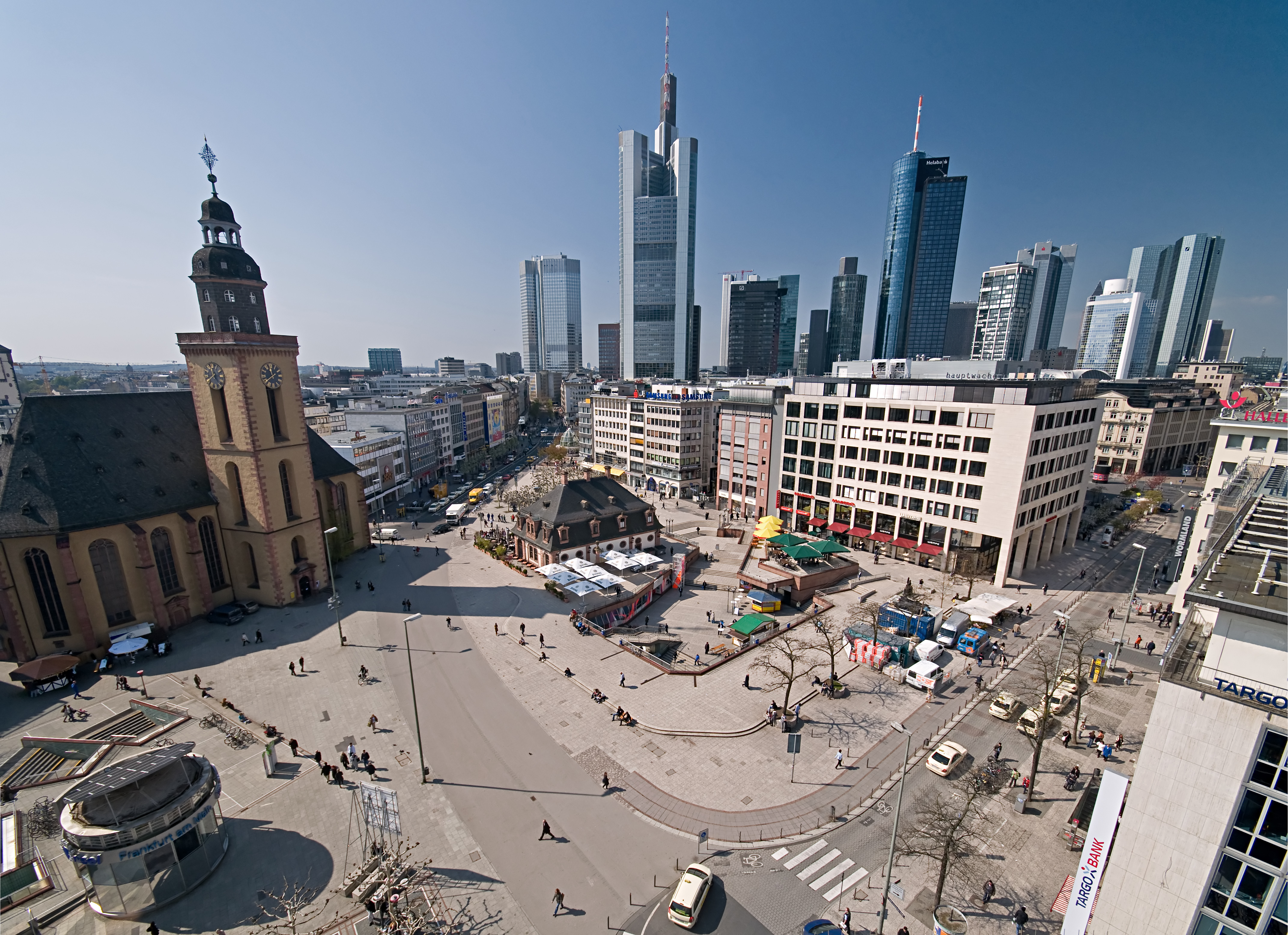 Die Hauptwache mit der Fußgängerzone im Ganzen, Blick vom Kaufhof, April 2010